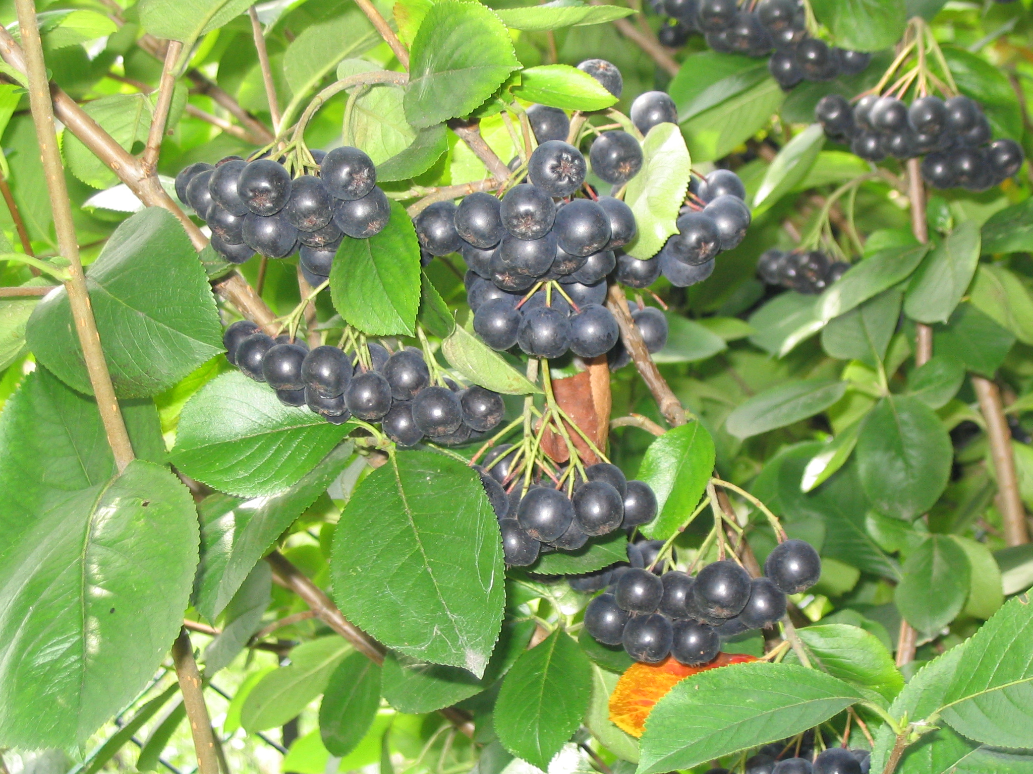 Aronia melanocarpa Author: Goku122